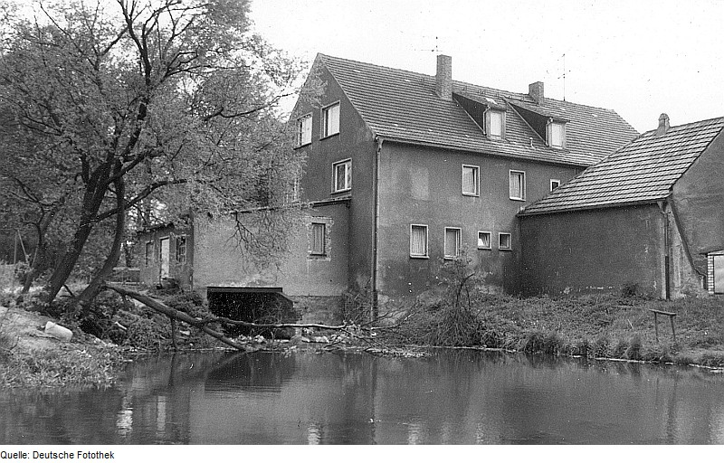 Original image description from the Deutsche Fotothek Radibor-Lippitsch. Ehem. Mühle